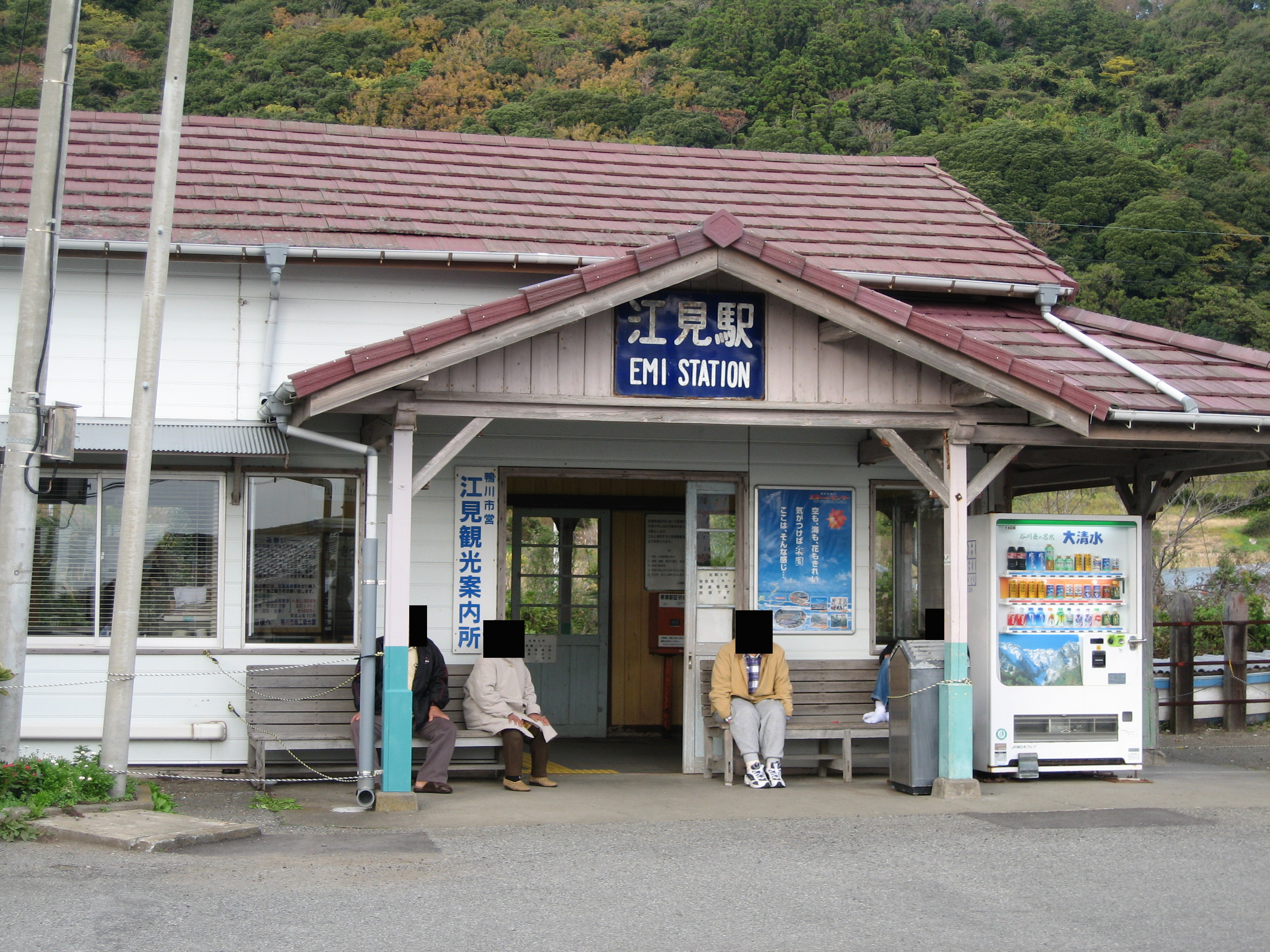 Emi station, Uchibo Line, Chiba, Japan, 江見駅